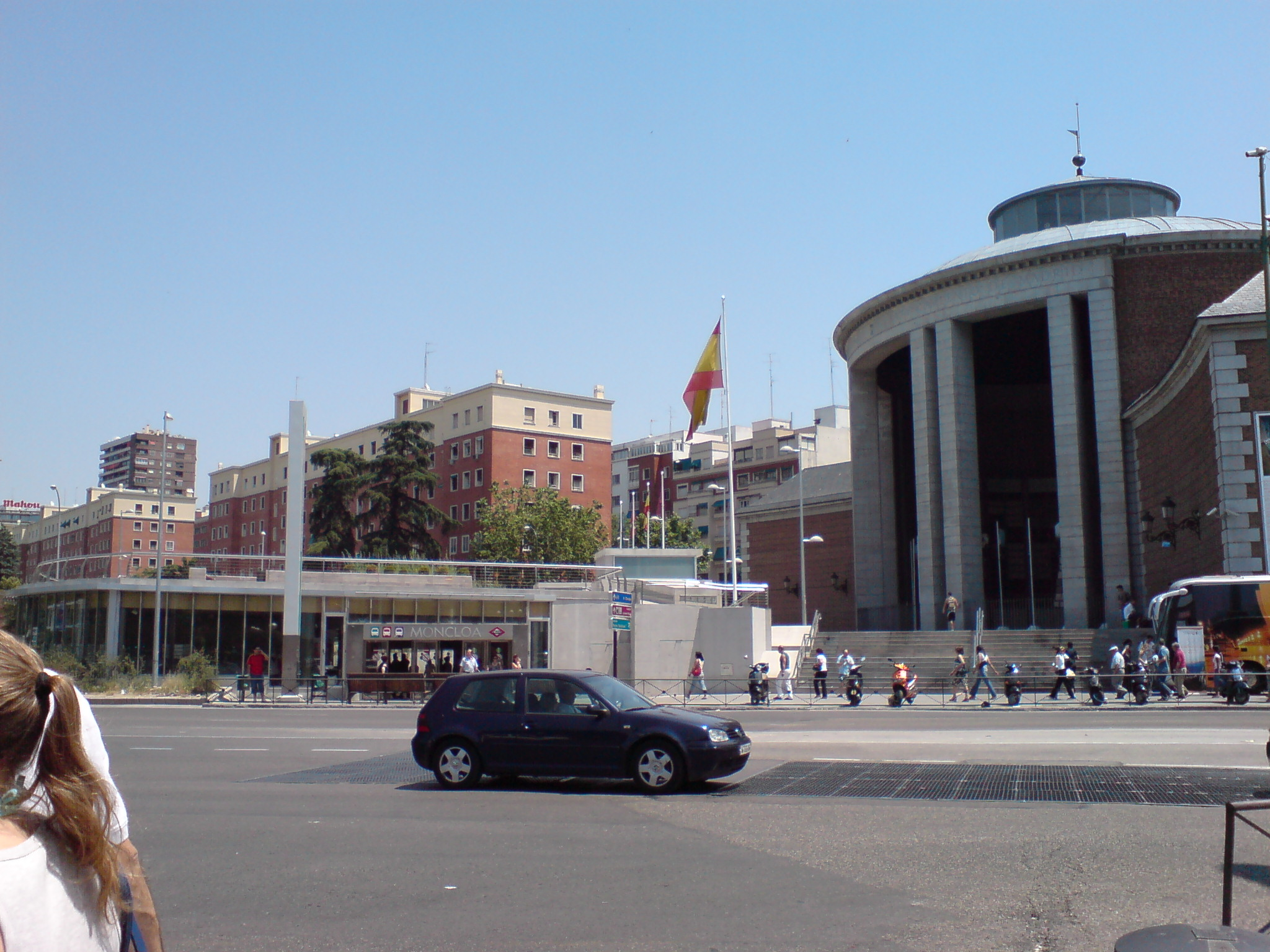 Nuevo intercambiador de transportes de Moncloa; a su derecha junta de distrito de Moncloa-Aravaca